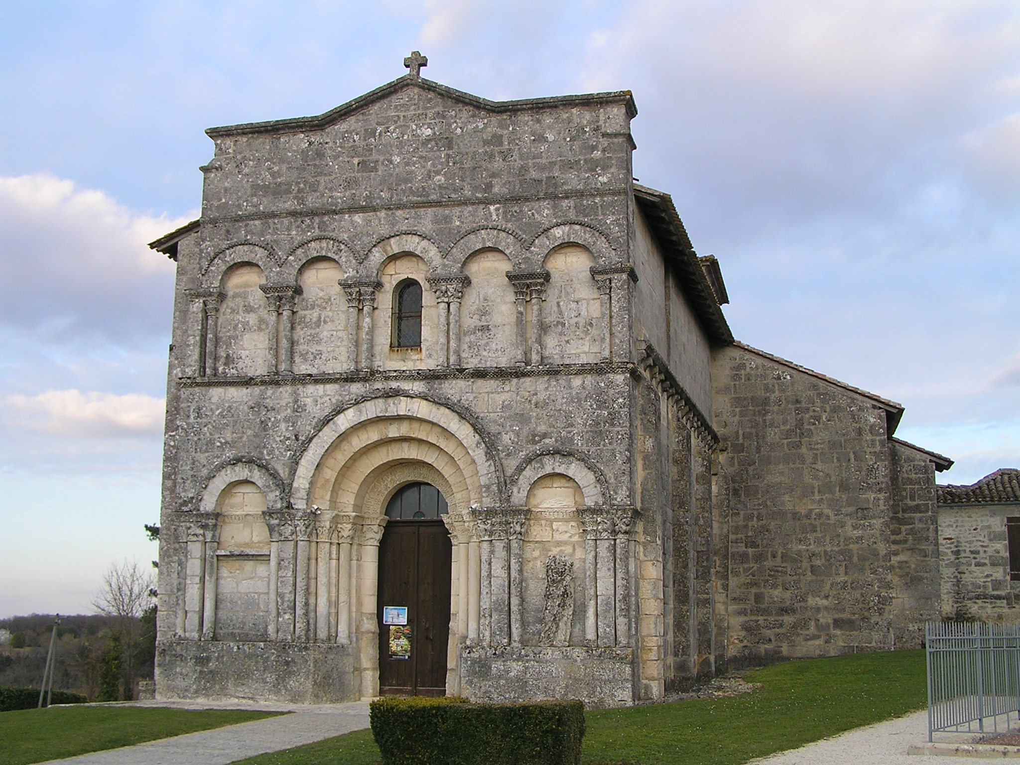 église de Dirac, Charente, France